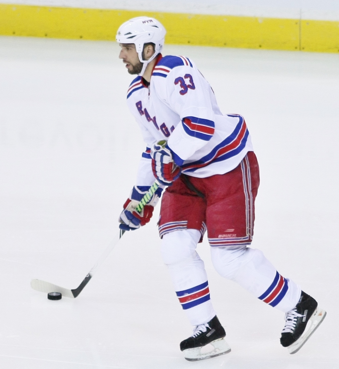 Michal Rozsíval, Czech ice hockey defender